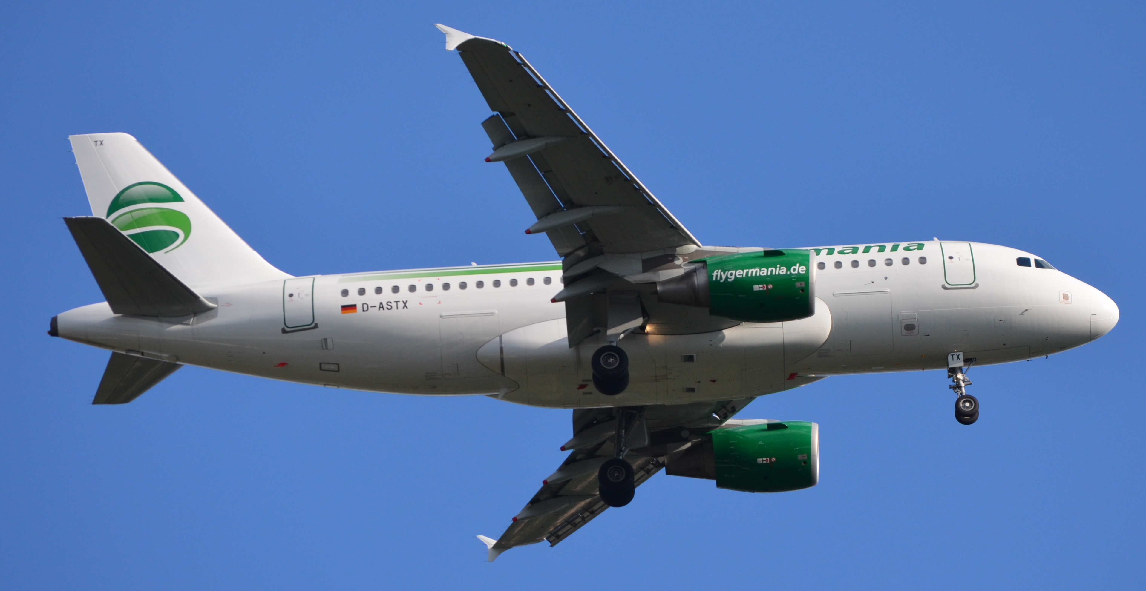 Flugzeug mit der Registrierung D-ASTX der Fluggesellschaft Germania im Anflug auf Flughafen Berlin-Tegel